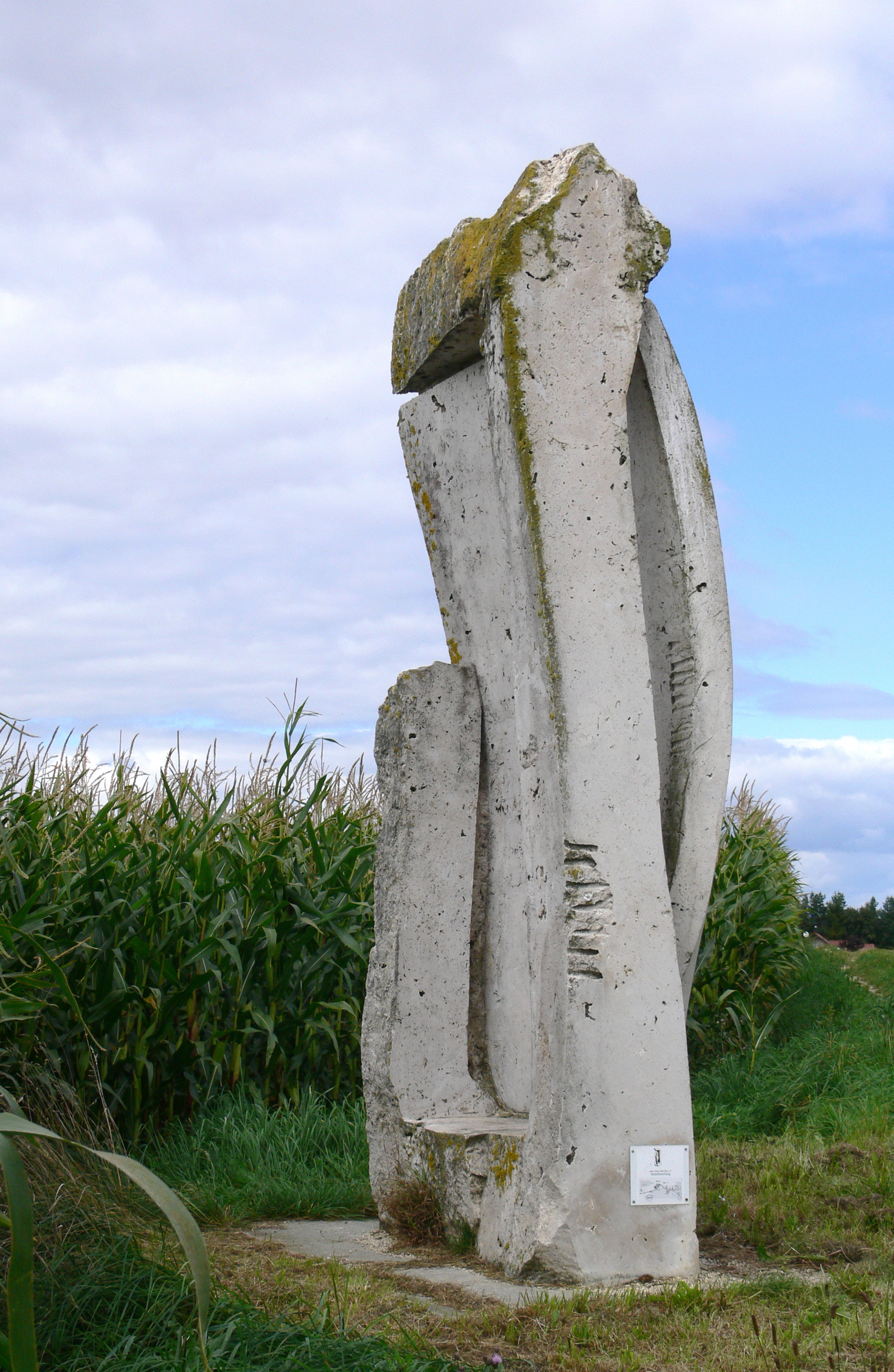 Skulpturenfeld Oggelshausen, Landkreis Biberach Europäisches Bildhauersymposium 2000 Josef Nadj: Verantwortung